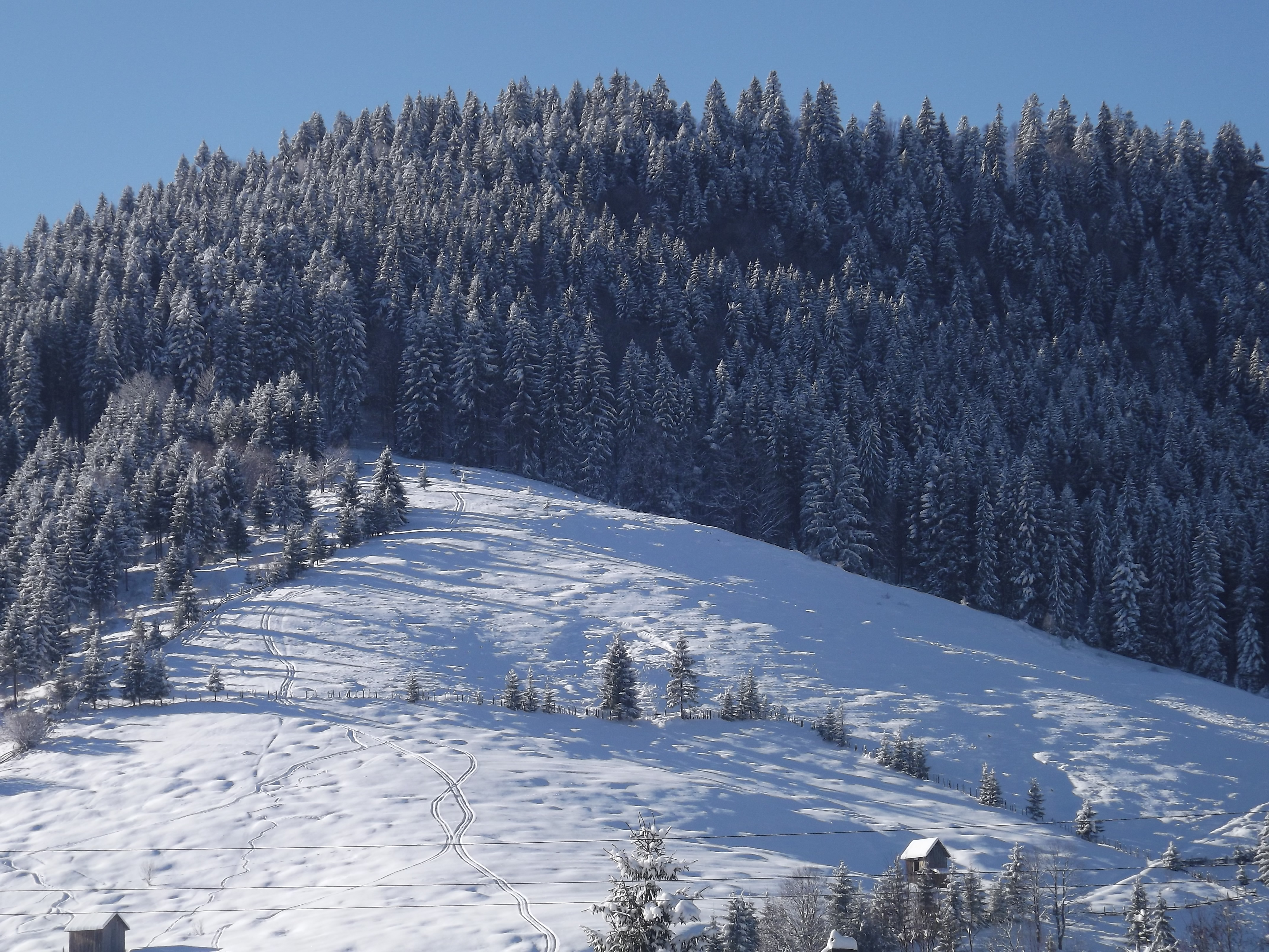 Iarna